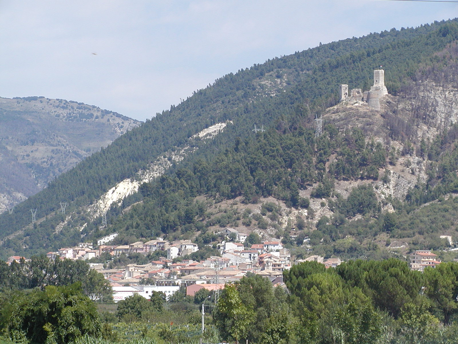 Blick auf Popoli